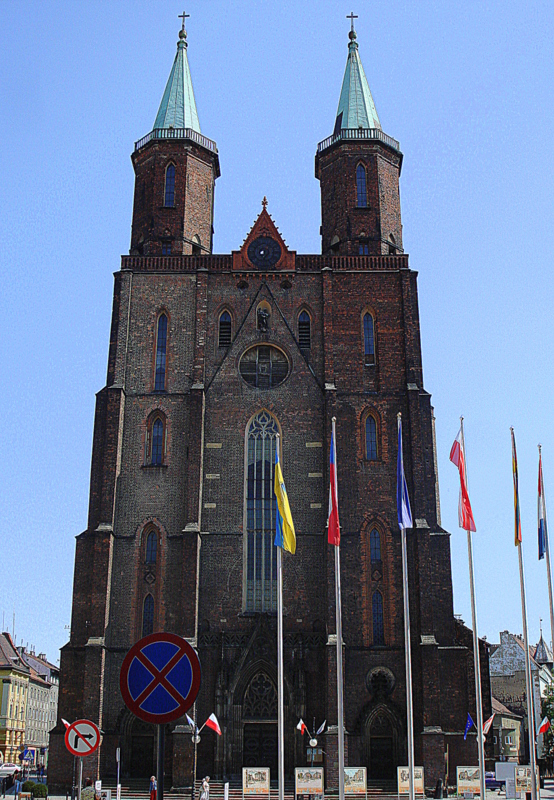 Legnica, pl. Mariacki - kościół ewangelicko-augsburski